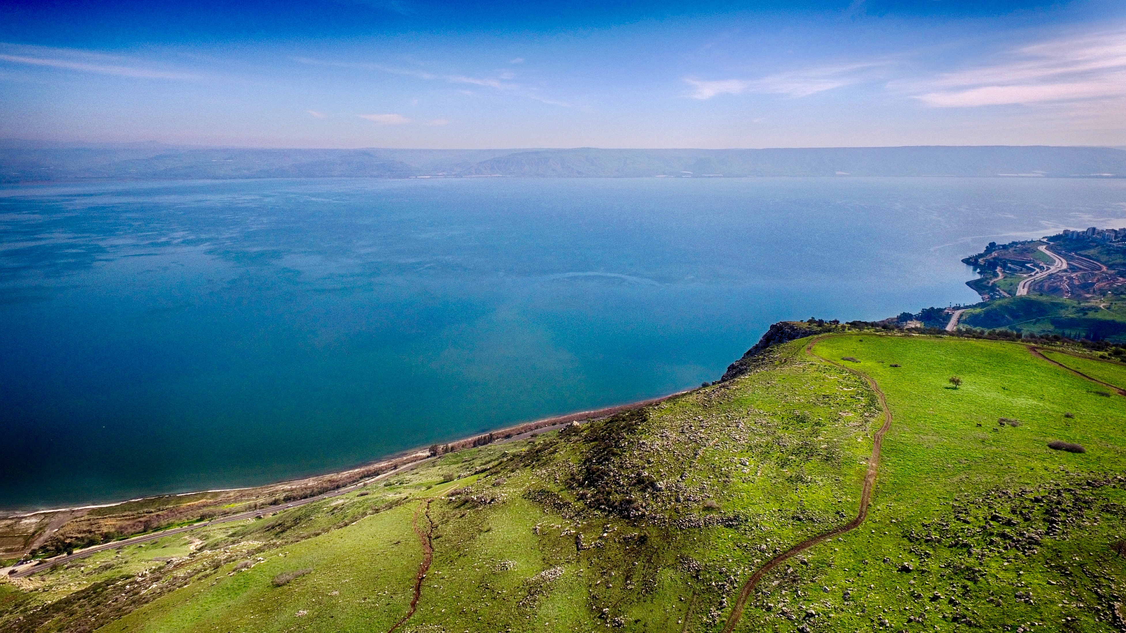 הכנרת ממעוף הציפור